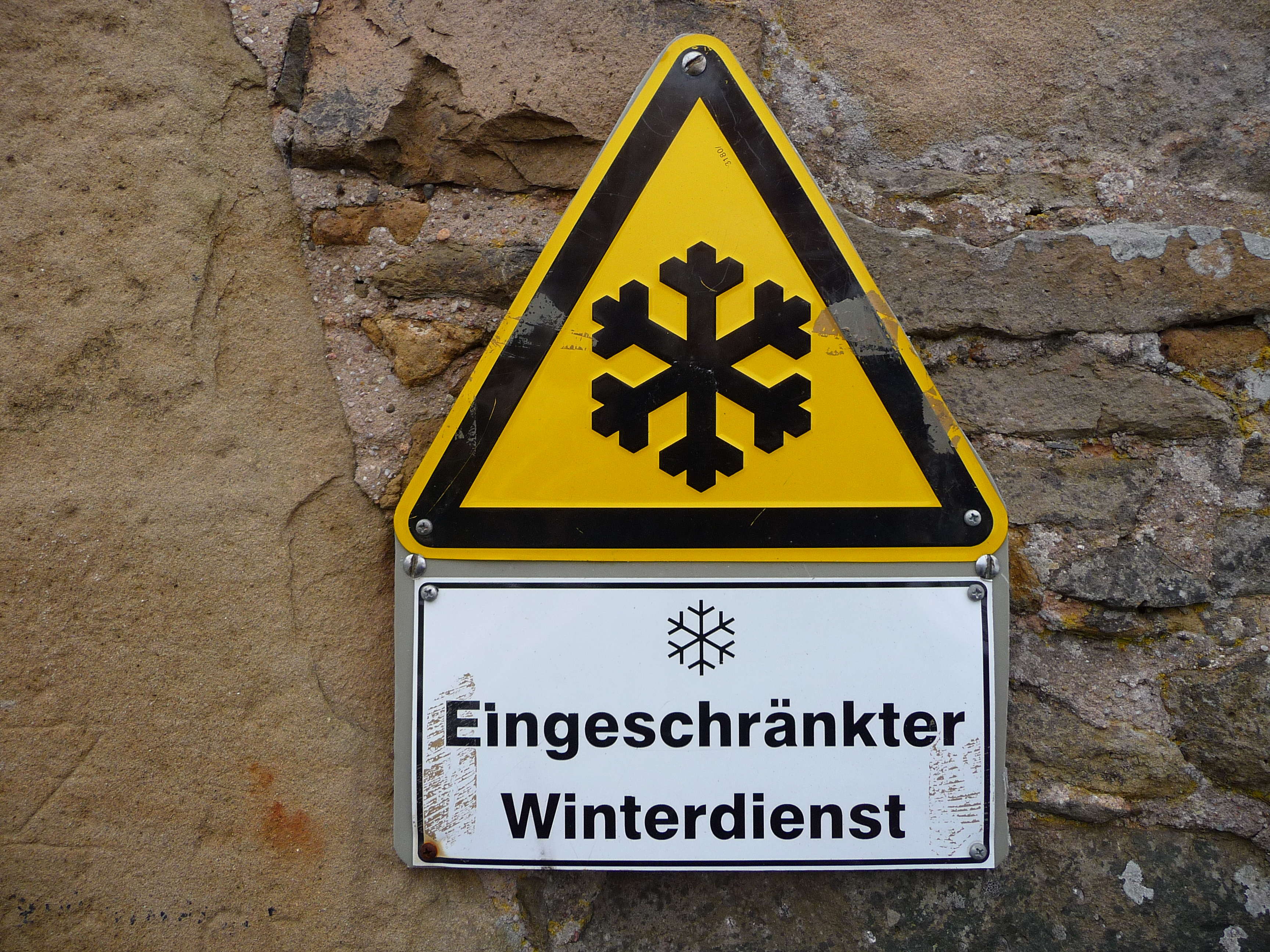 Warnhinweis eingeschränkter Winterdienst